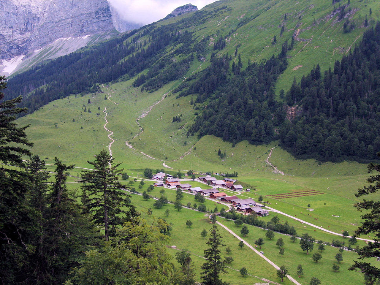 Die Engalm vom Aufstieg zur Binsalm gesehen